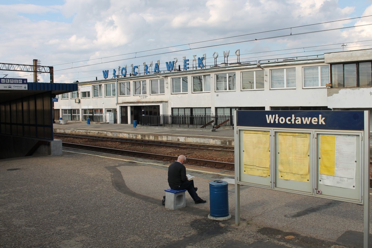 Budynek i perony stacji we Włocławku. This photo was taken during Railway Wikiexpedition 2014 set up by Wikimedia Polska Association in cooperation with Fundacja Grupy PKP. You can see all photographs in category Wikiekspedycja kolejowa 2014.